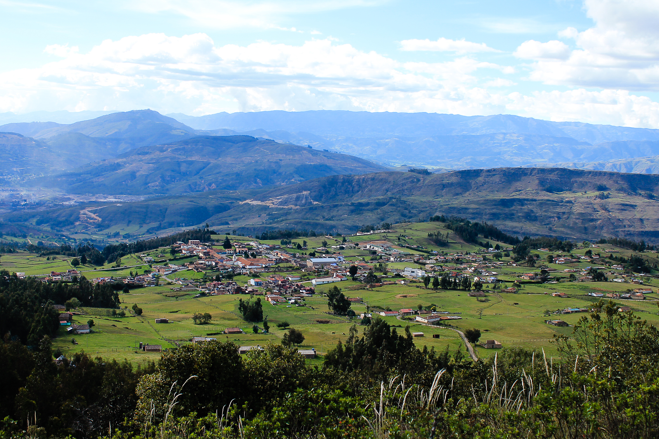 Tópaga visto desde uno de sus cerros. Boyacá, Colombia. Esta fotografía fue tomada en el municipio colombiano con código 15820.